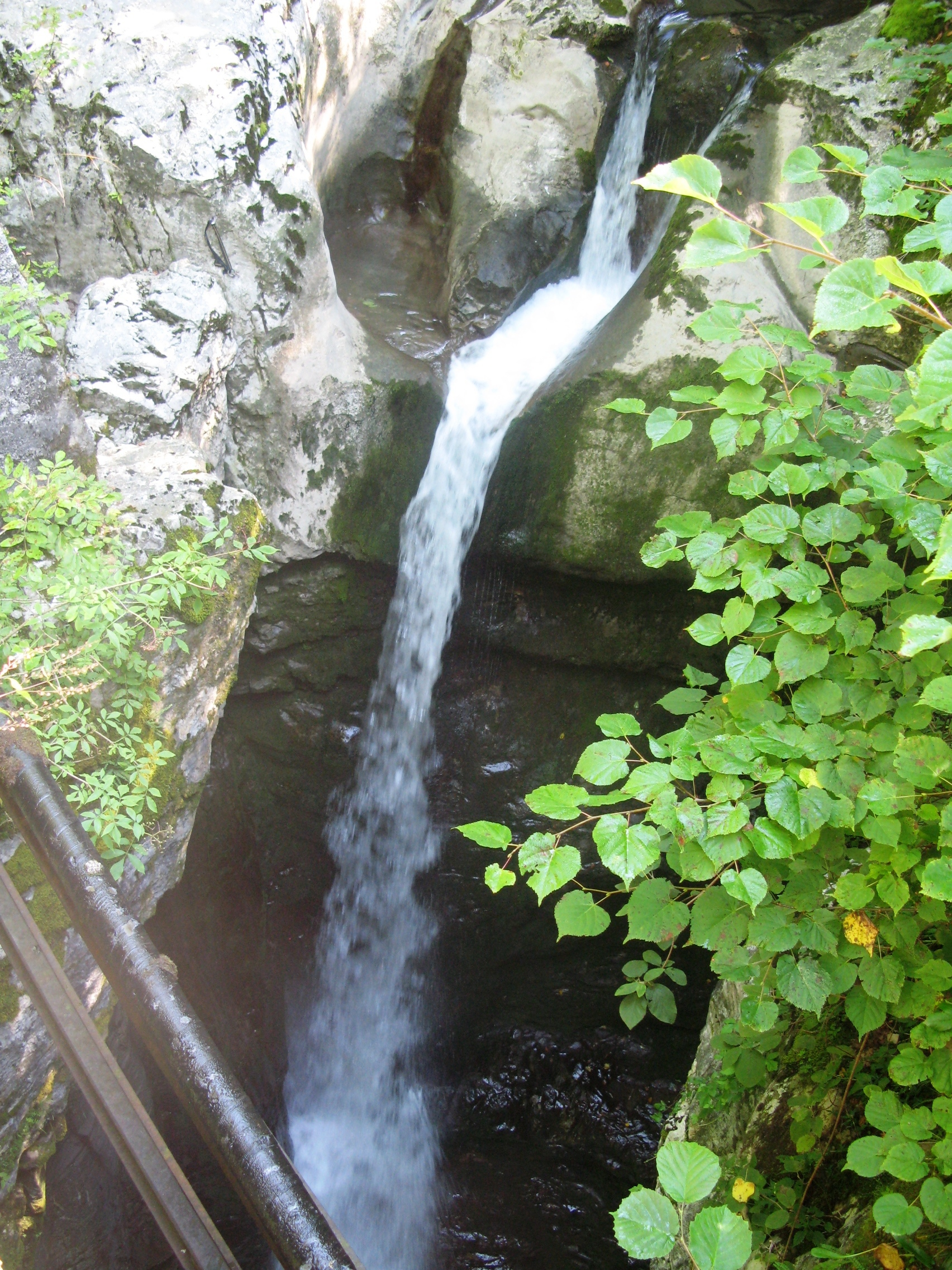 Slap Mali Kozjak